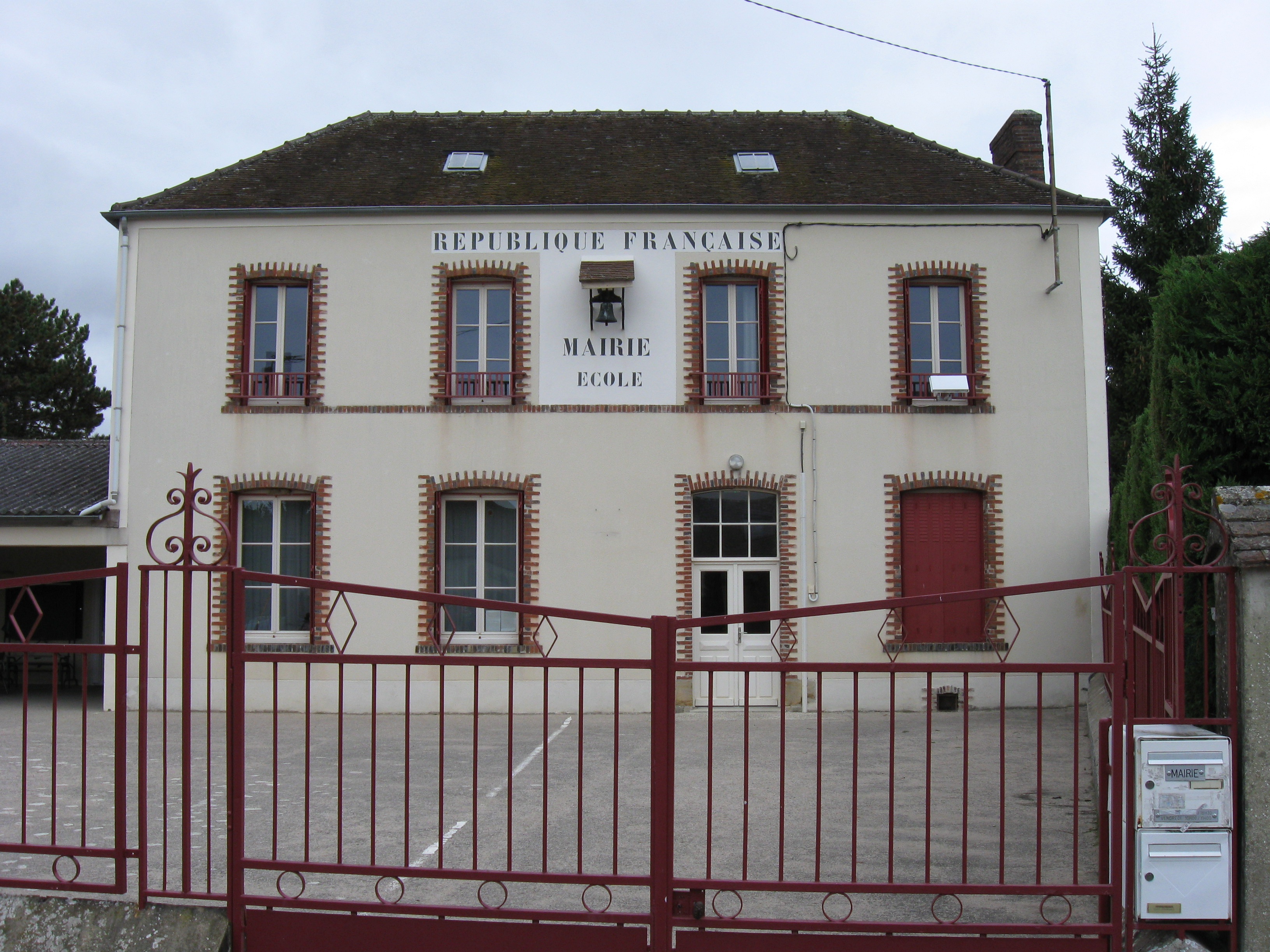 Mairie-école de Cessoy-en-Montois. (département de la Seine et Marne, région Île-de-France).